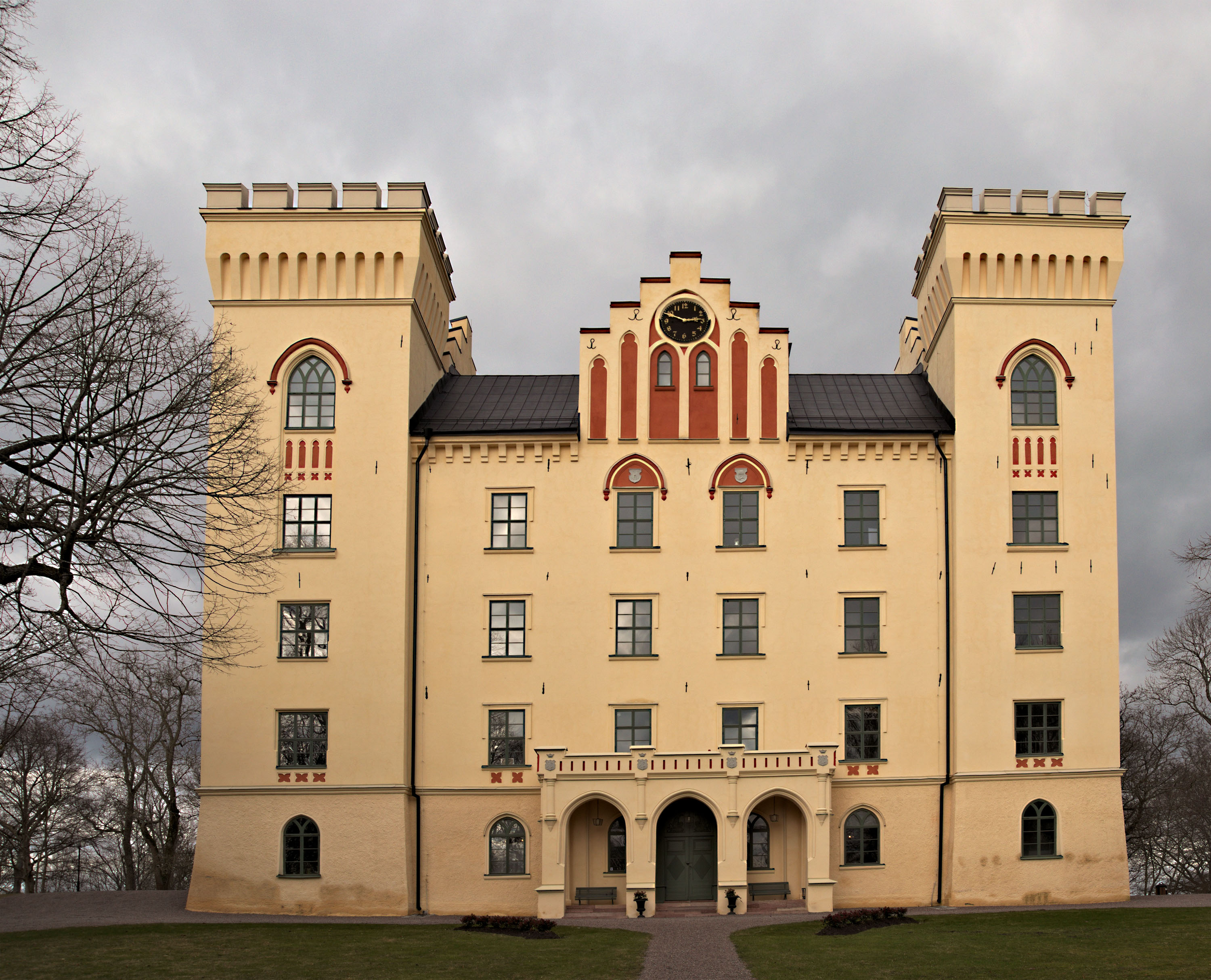 Solig framsida av Bogesunds slott